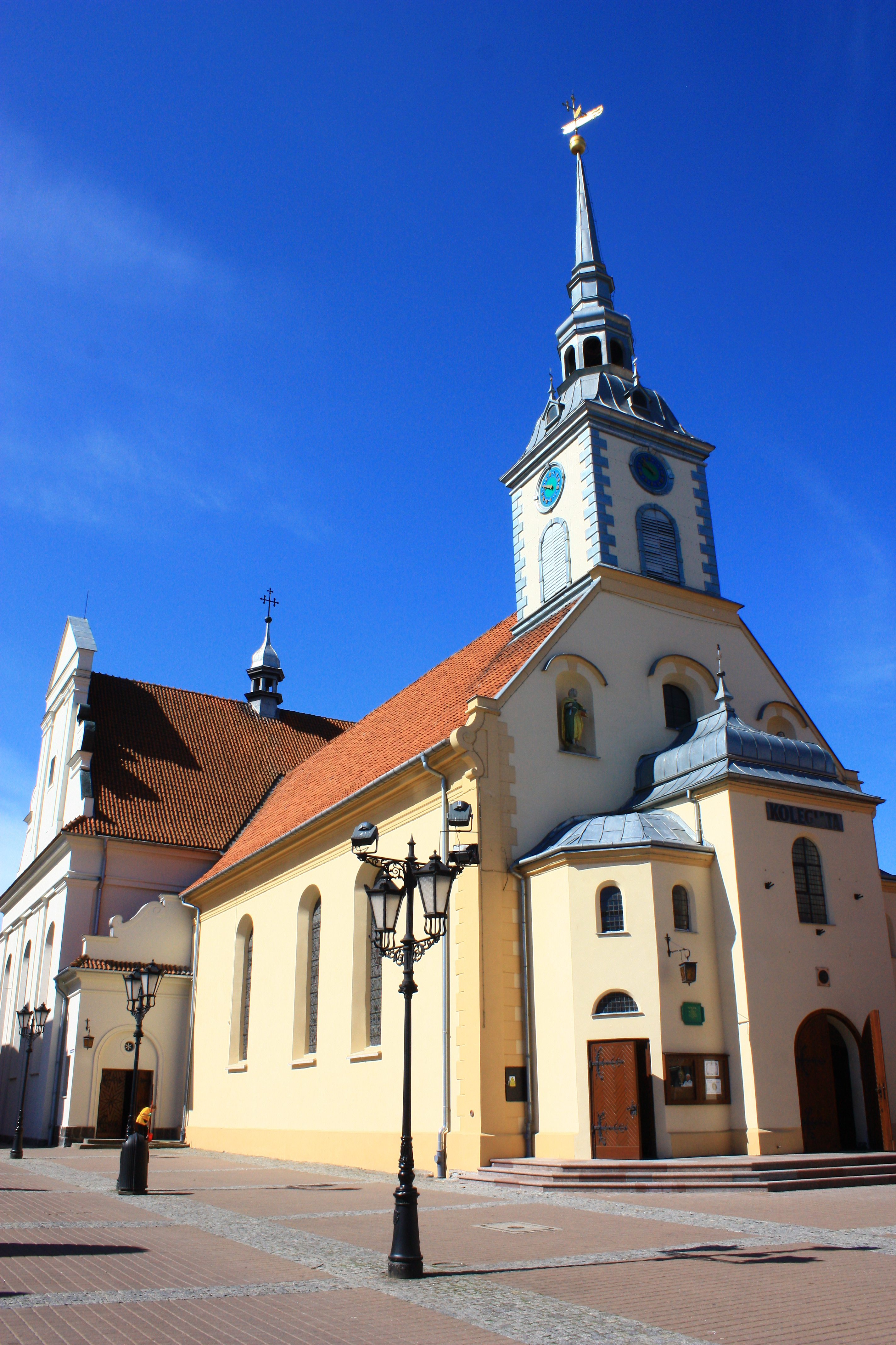 Wejherowo, Rynek / ul. Kościuszki - zespół kościoła par. p.w. Św. Trójcy, 1754-1755